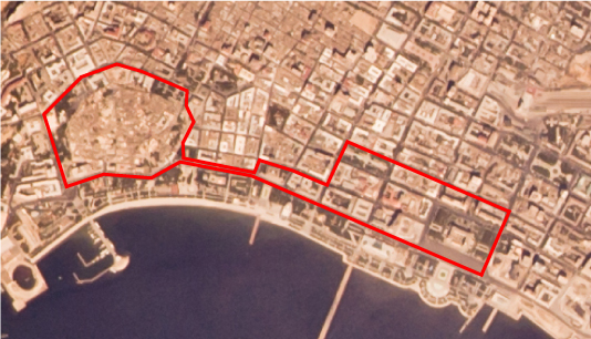 Formula 1 Circuit in Baku